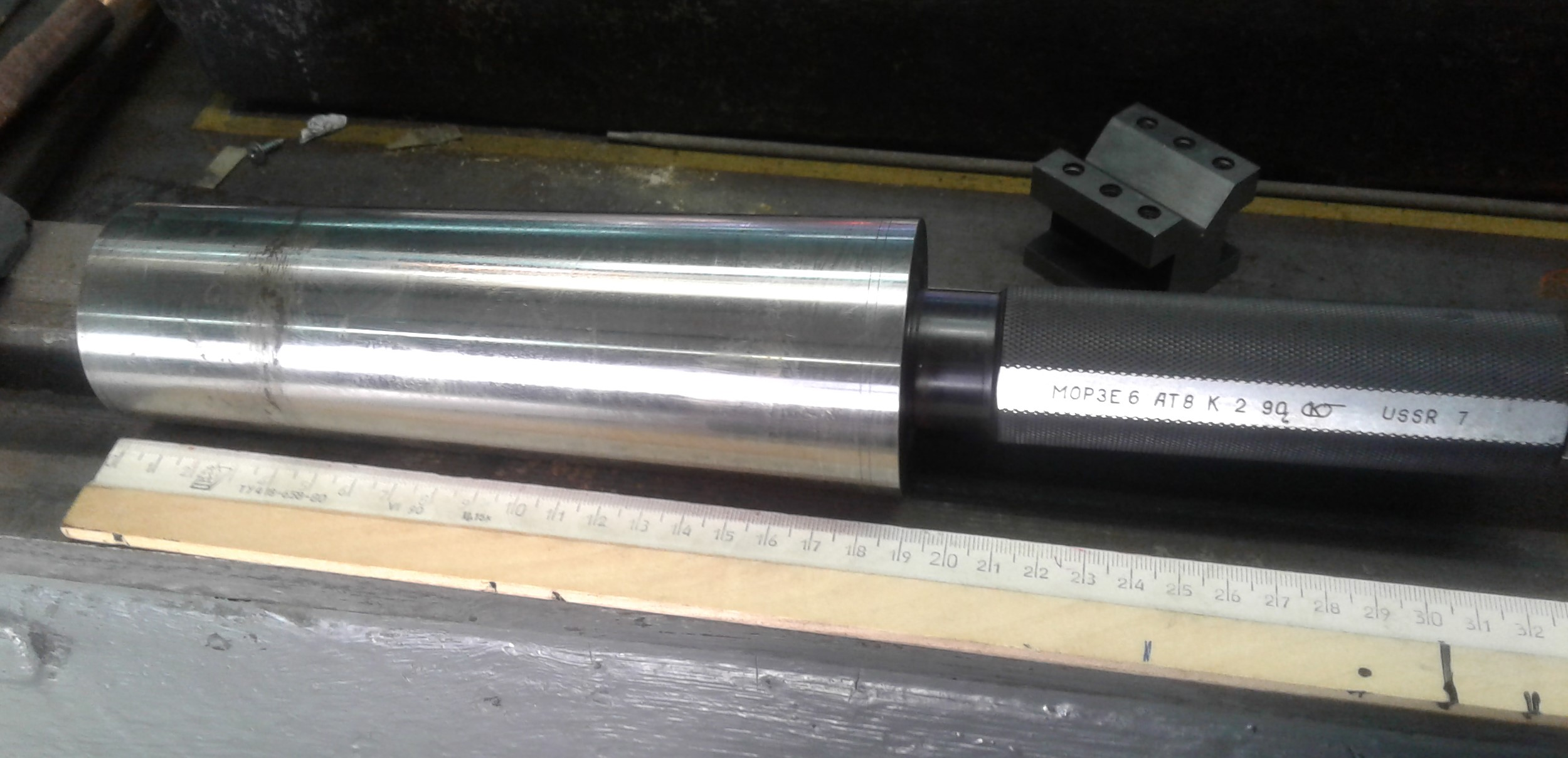 Калибр-пробка из комплекта калибров конуса Морзе №6.